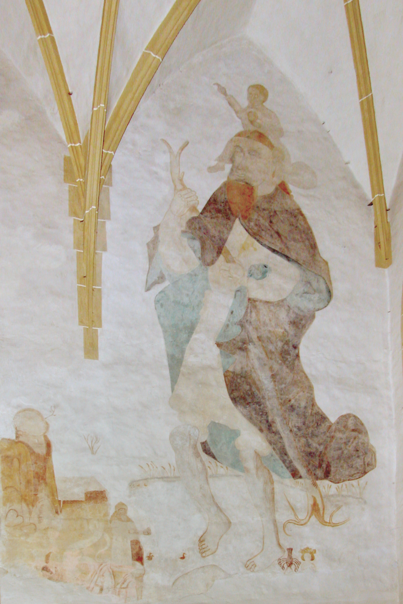 03.05.2009 04774 Dahlen (Sachsen), Kirchstraße (GMP: 51.364957,13.000966): Stadtkirche Unserer Lieben Frauen. Das Fresko an der Südwand des Chores stellt Christophorus dar. [DSCN37115.TIF]20090503195DR.JPG(c)Blobelt